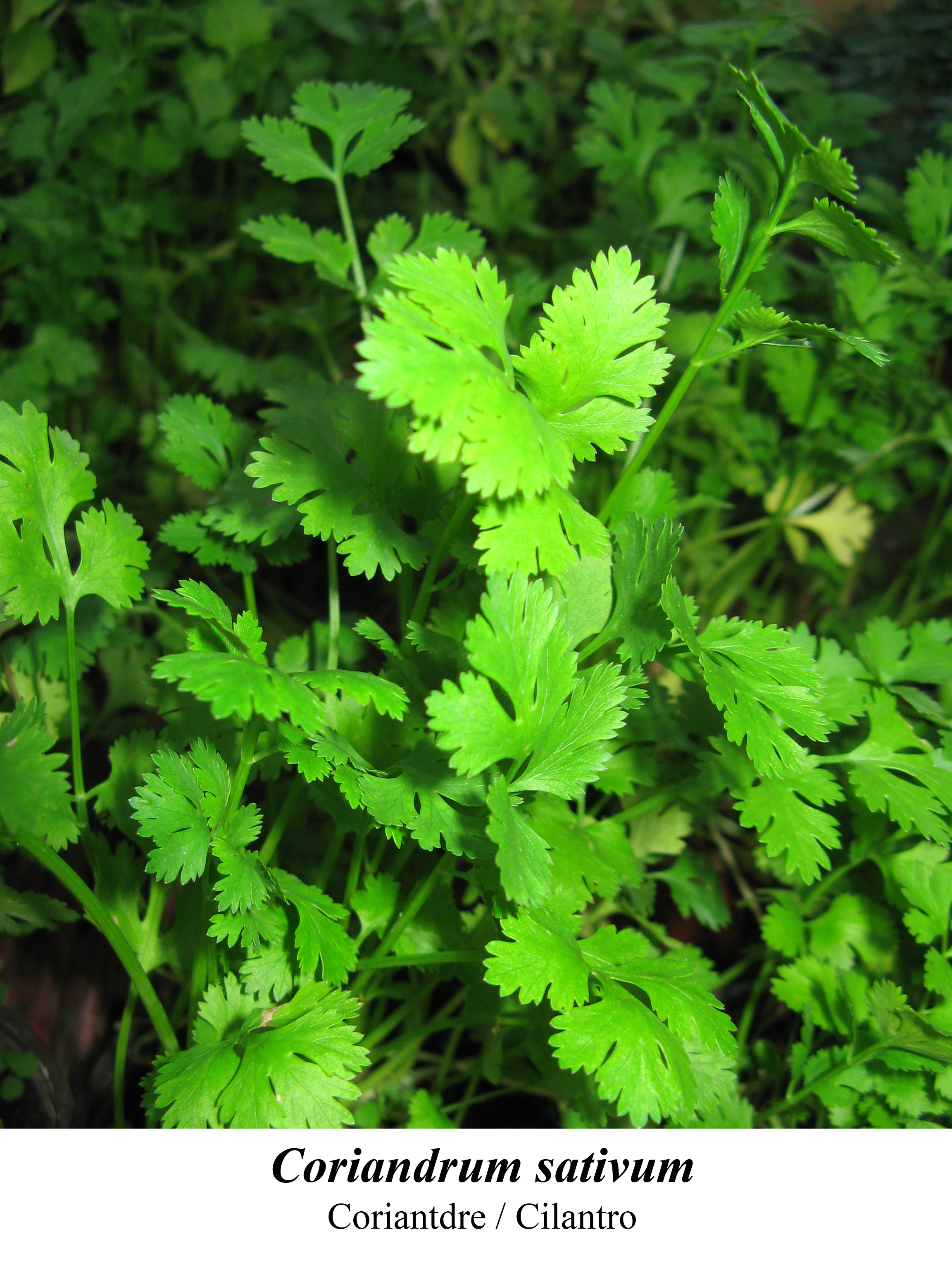 planta medicinal